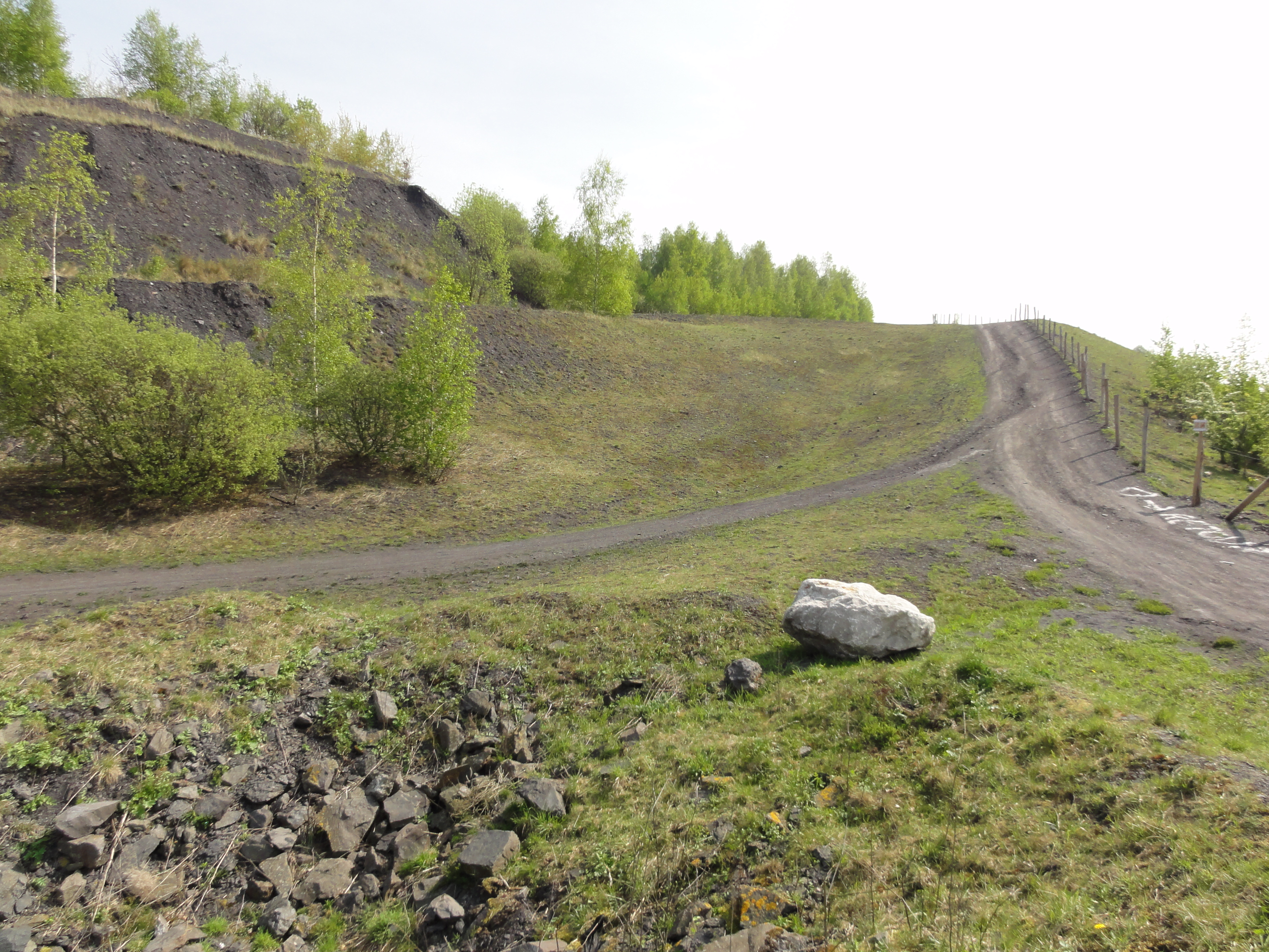 Terrils nos 116 et 117 dits 10 d'Oignies, fosse n° 10 du Groupe d'Oignies dans le bassin minier du Nord-Pas-de-Calais, Dourges, Pas-de-Calais, Nord-Pas-de-Calais, France. Les terrils nos 116 et 117 sont inscrits sur la liste du patrimoine mondial de l'Unesco le 30 juin 2012 et y constituent en partie le site no 42.